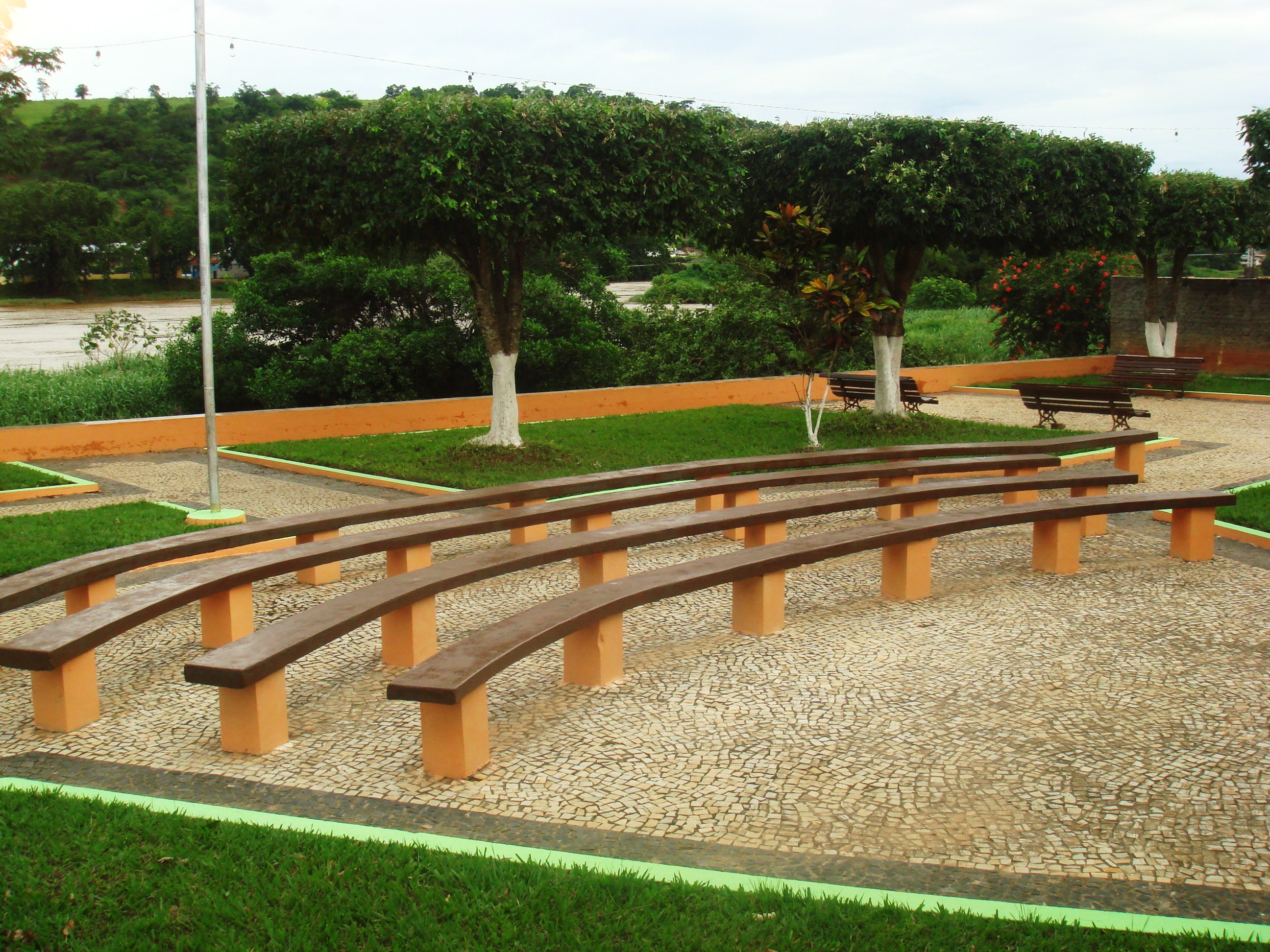 Área Central da Pracinha - Praça Júlio Boechat